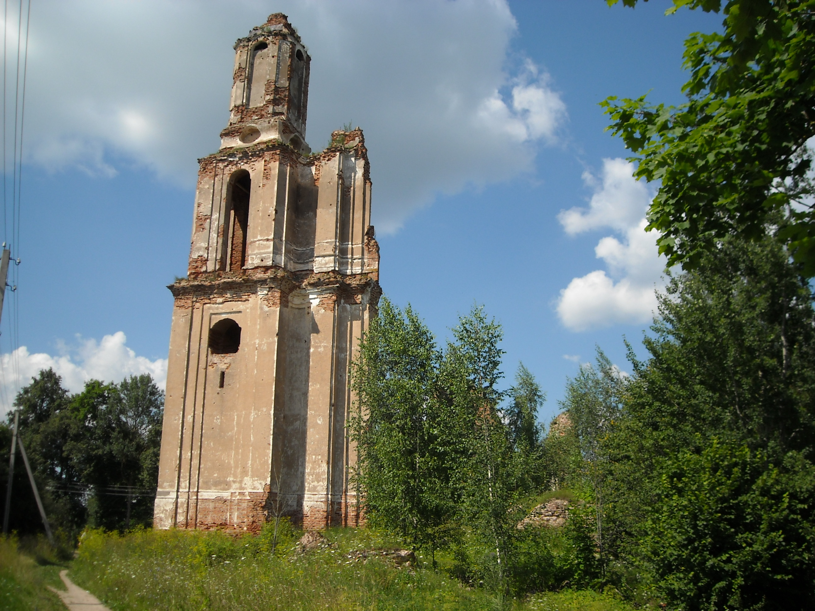 Беларуская (тарашкевіца): Рэшткі касьцёла. в. Губіна This is a photo of Belarusian heritage monument. Reference number: 213Г000501 ( WLM)